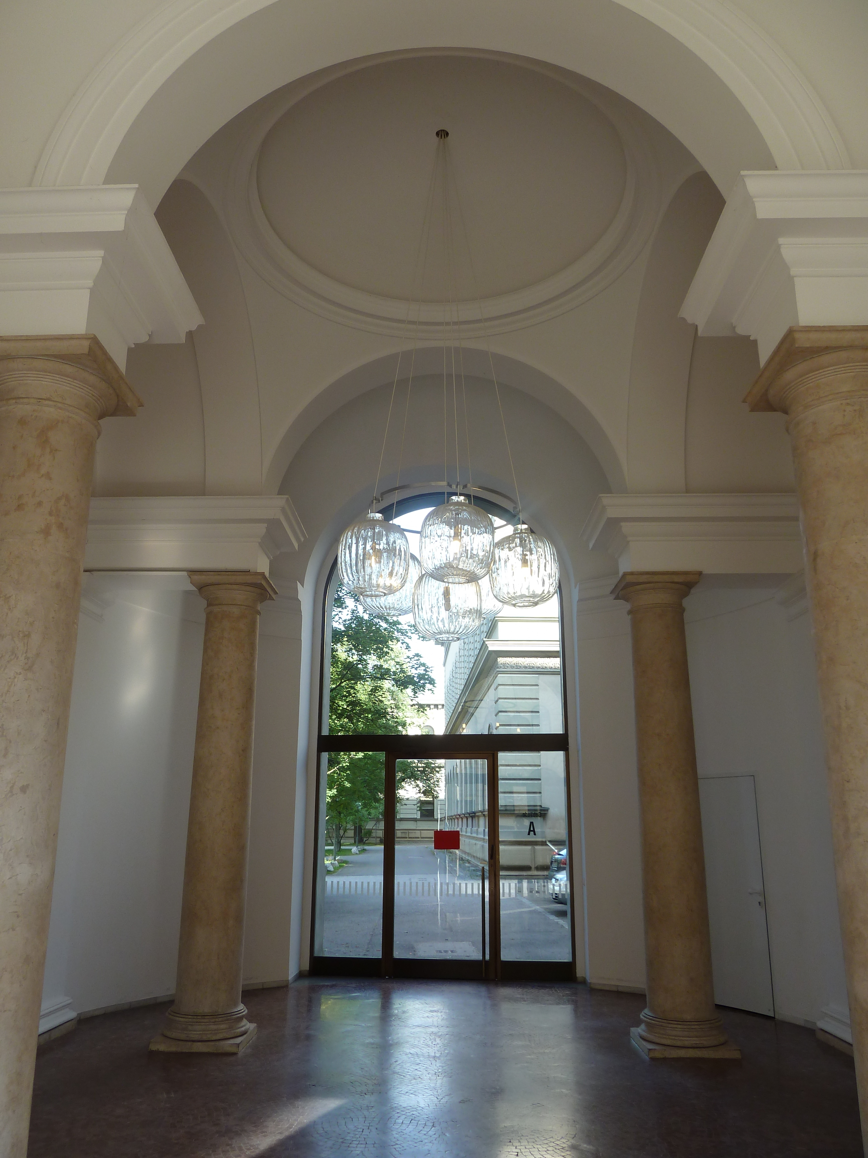 Eingangsbereich des ehemaliges Bayerischen Kriegsministerium München